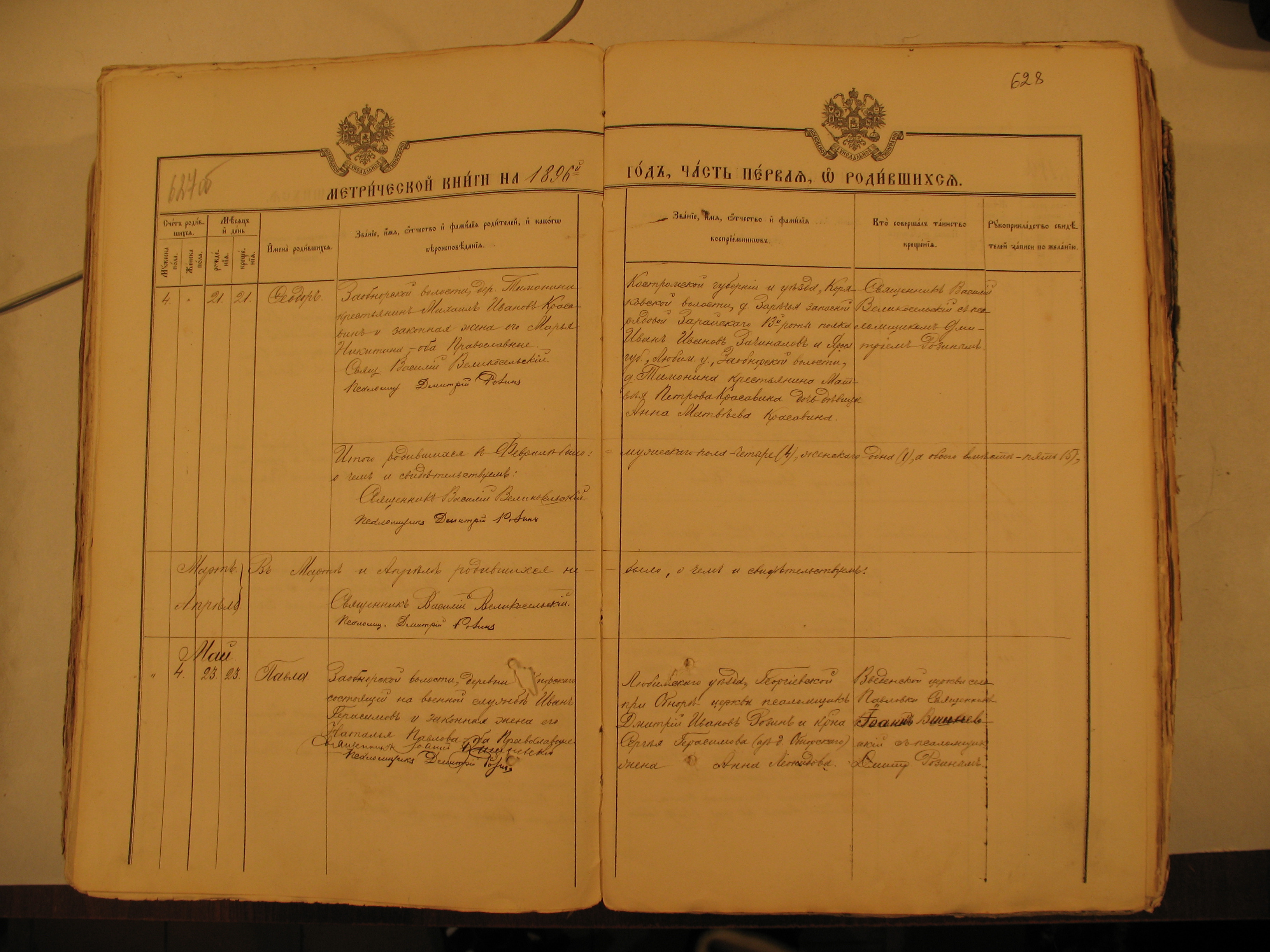 Страница метрической книги на 1896-й год с записью о рождении Красавина Ф.М.